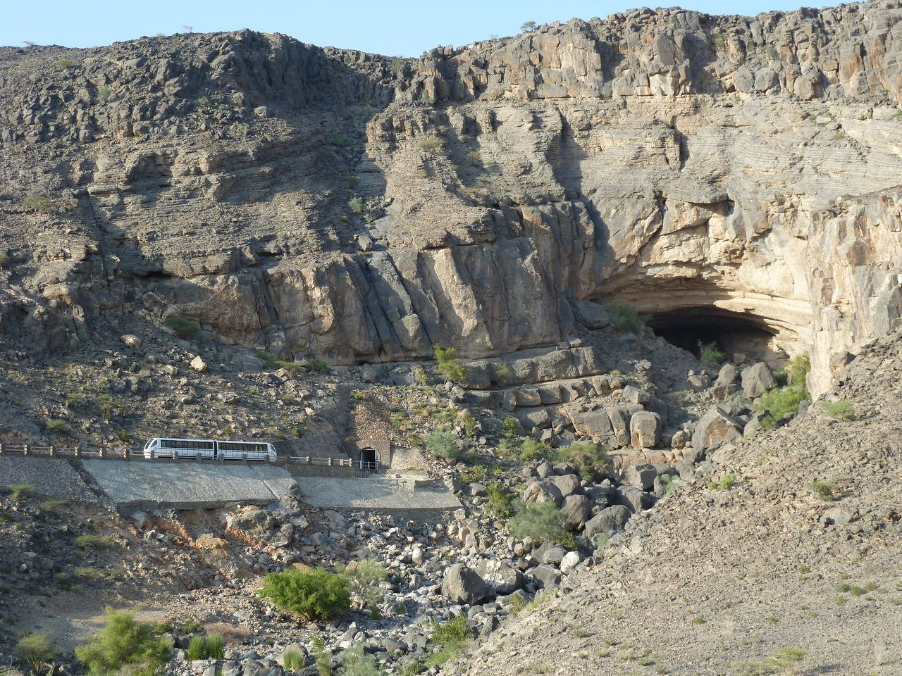 Al Hootah Cave, Oman